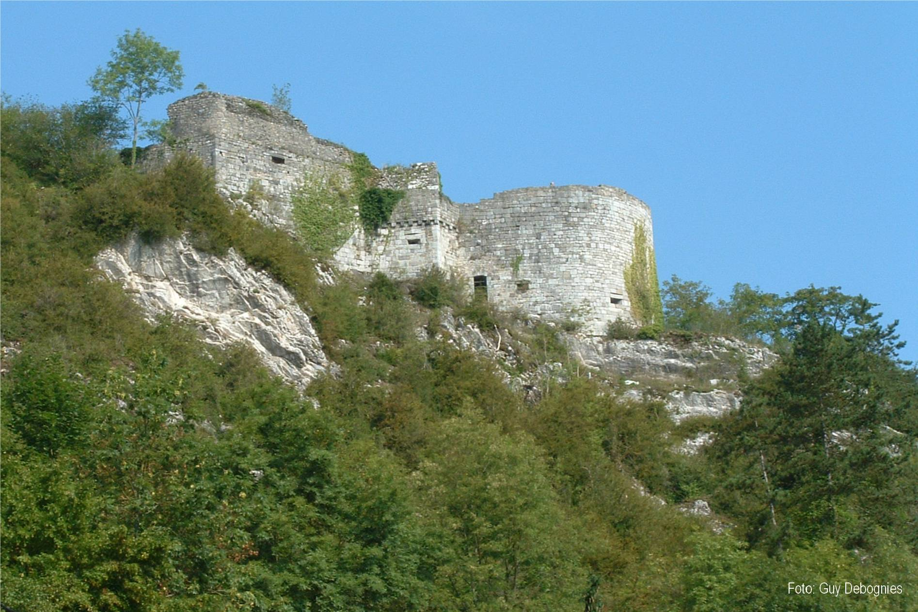 Eigen foto (23/08/2006)